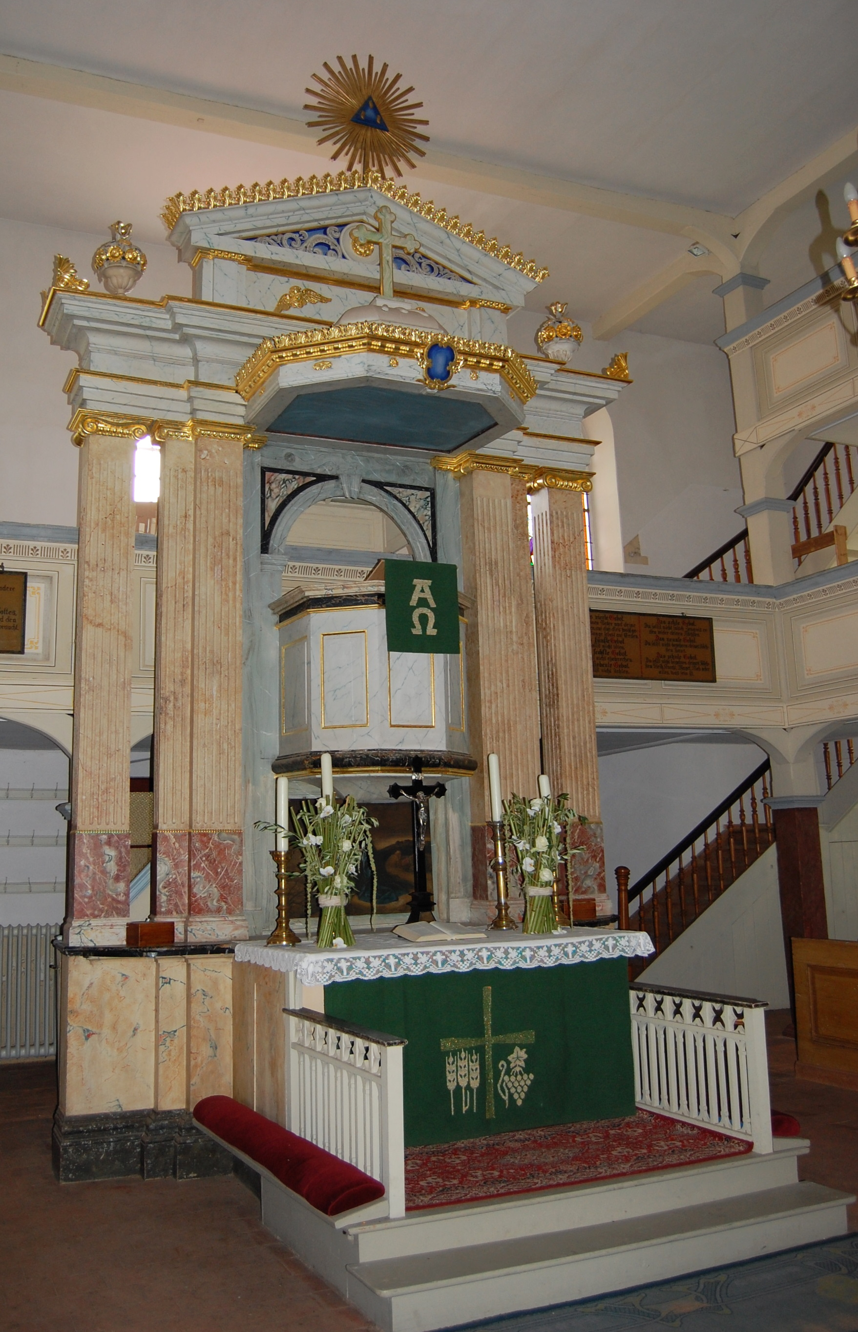 Pfarrkirche Burg (Spreewald), Kanzelaltar